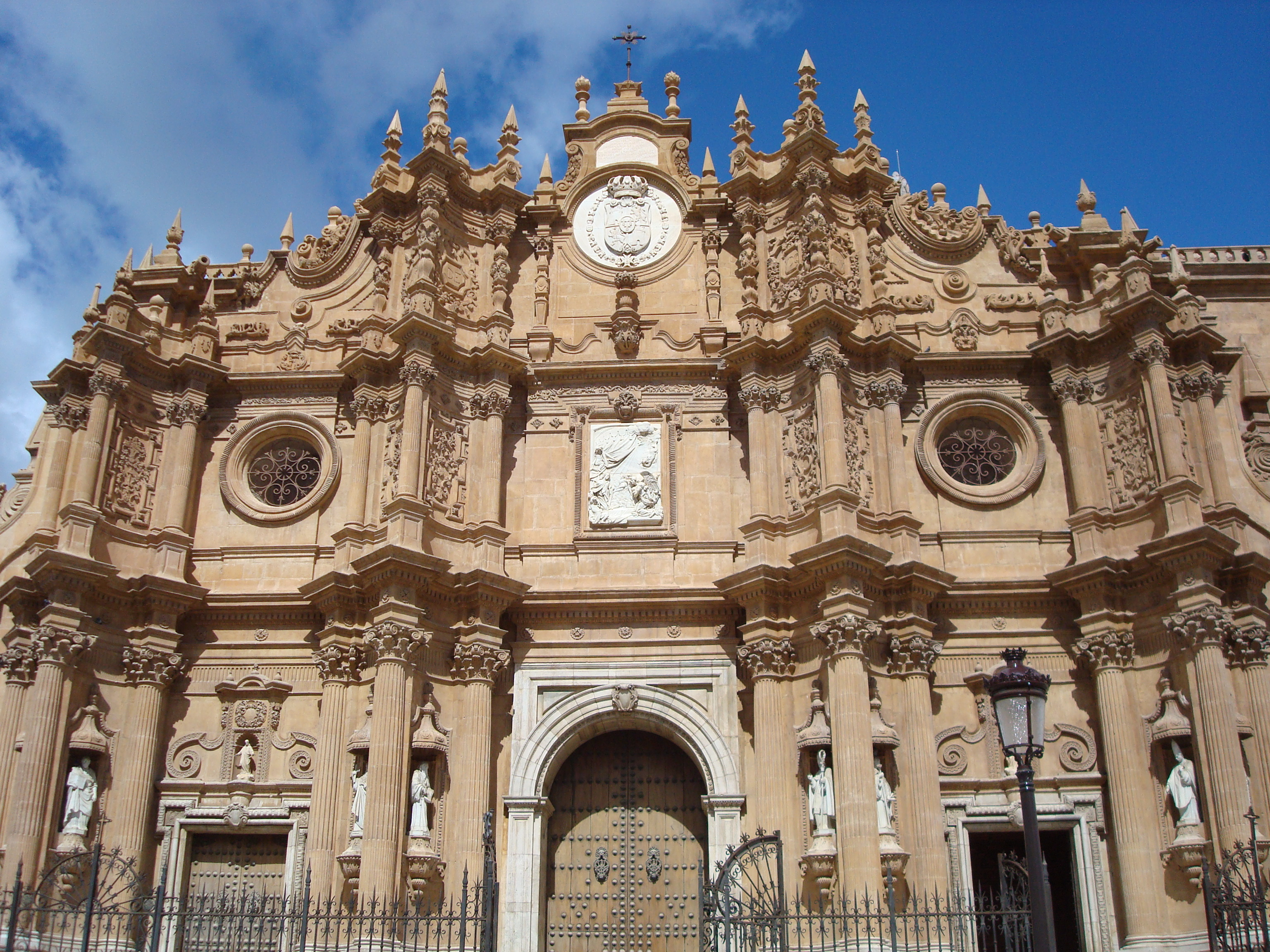 Guadix - 003 Guadix